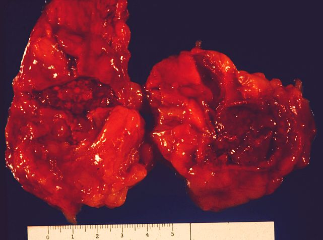 Necrosi hemorràgica suprarenal bilateral (Síndrome de Waterhouse-Friderichsen.